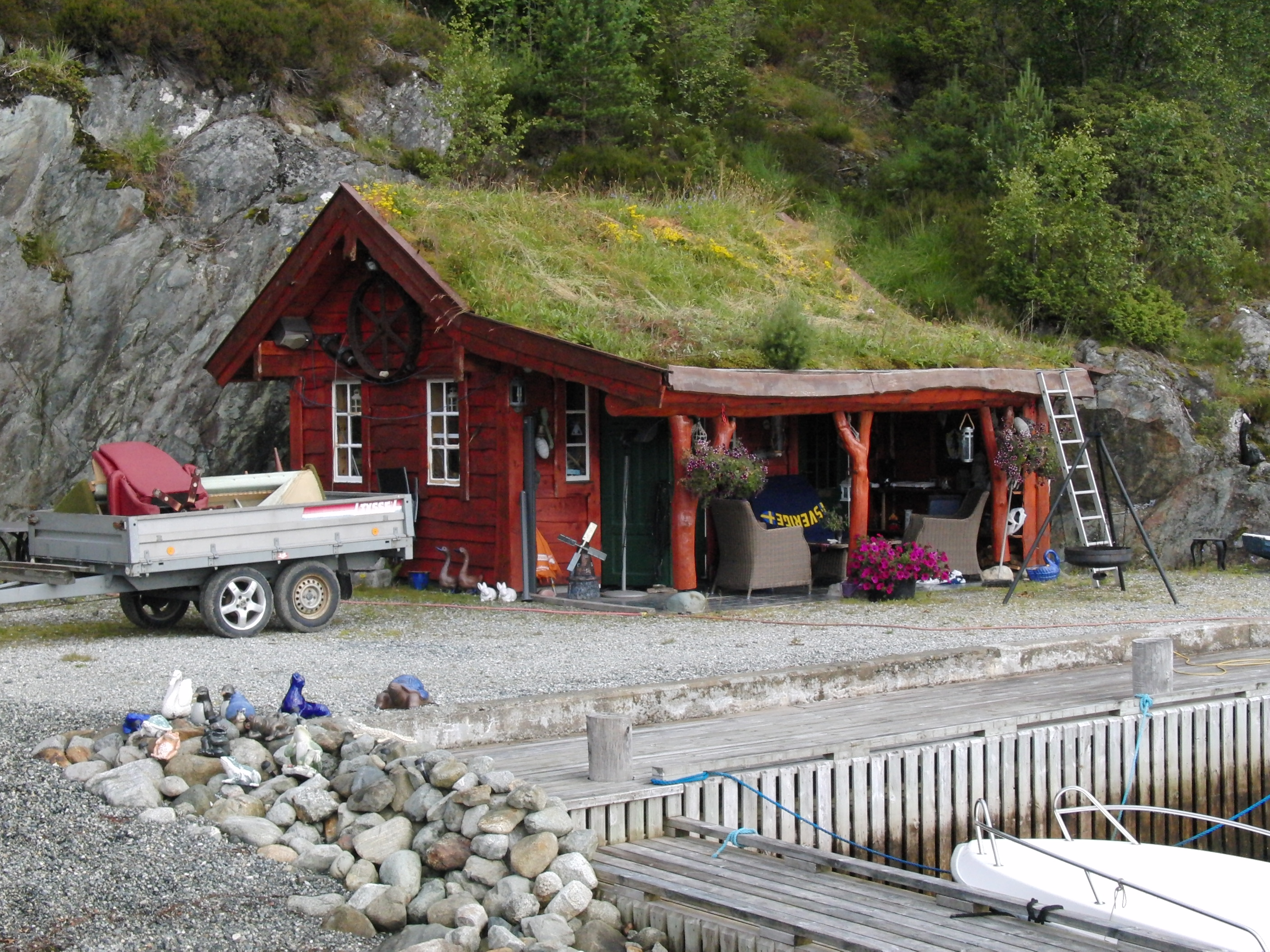 Aspenes mikrokraftverk